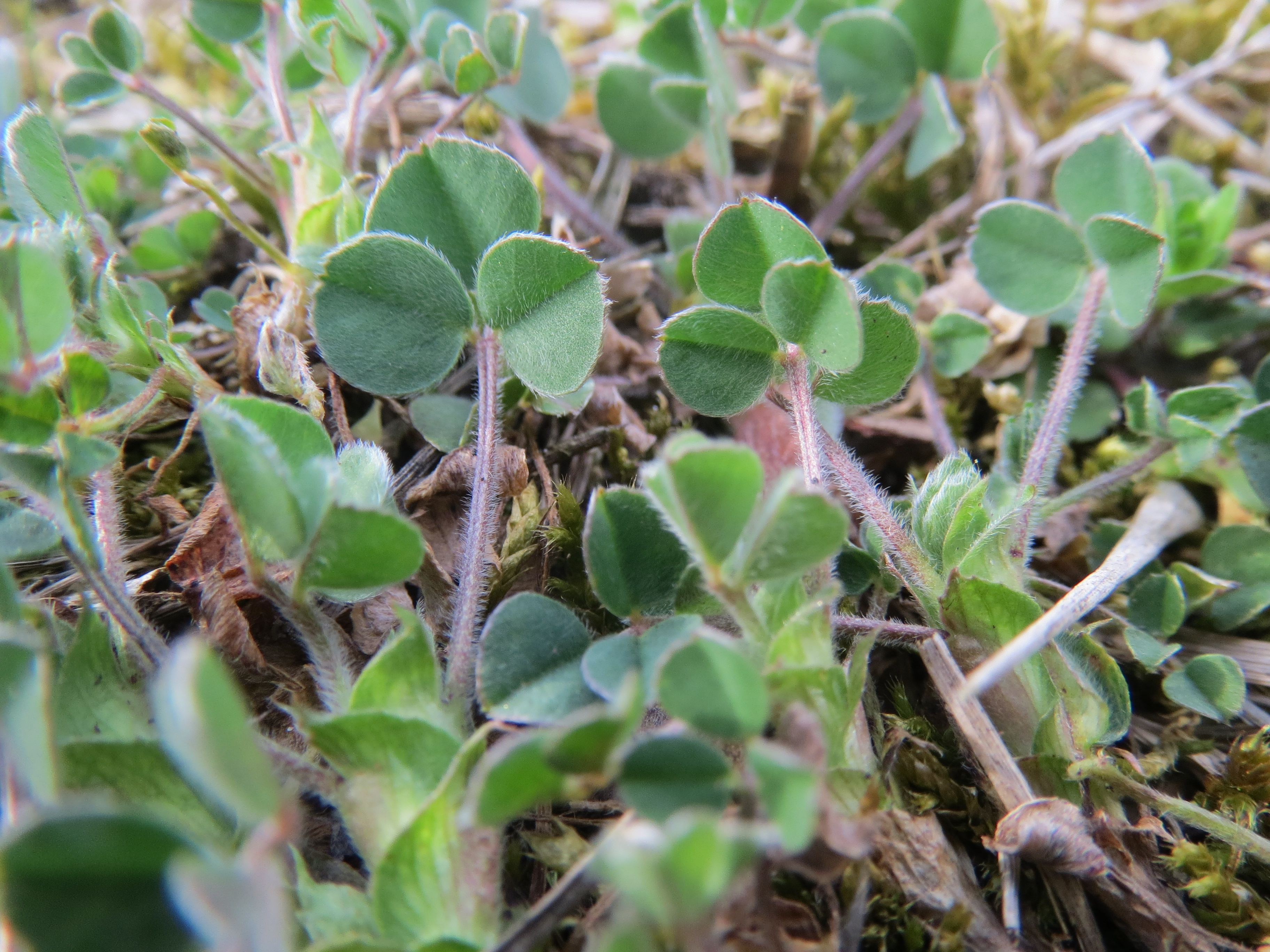 Der erste Thymian (Thymus pulegioides) im Schwetzinger Hardt